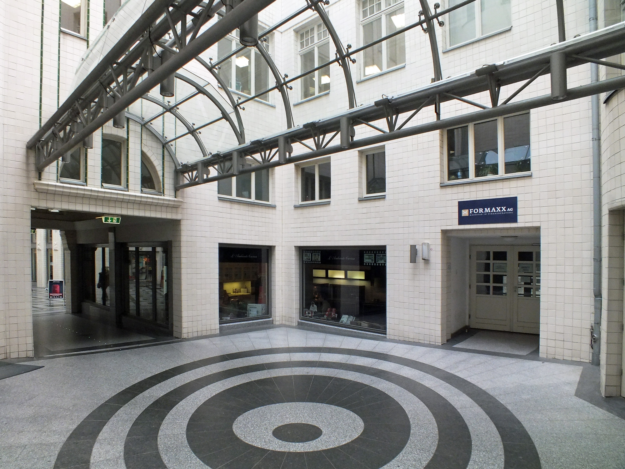 Durchgang im Jägerhof in Leipzig